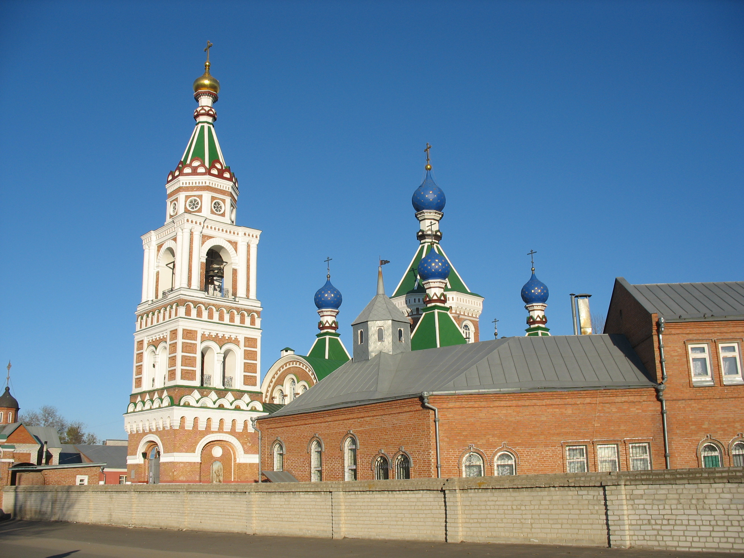 Казанская церковь а Отрожке (1909 год)